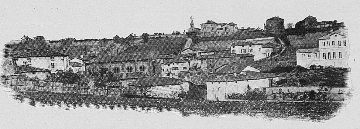 Dictionnaire illustré des communes du département du Rhône. Tome 1 / par MM. E. de Rolland et D. Clouzet.